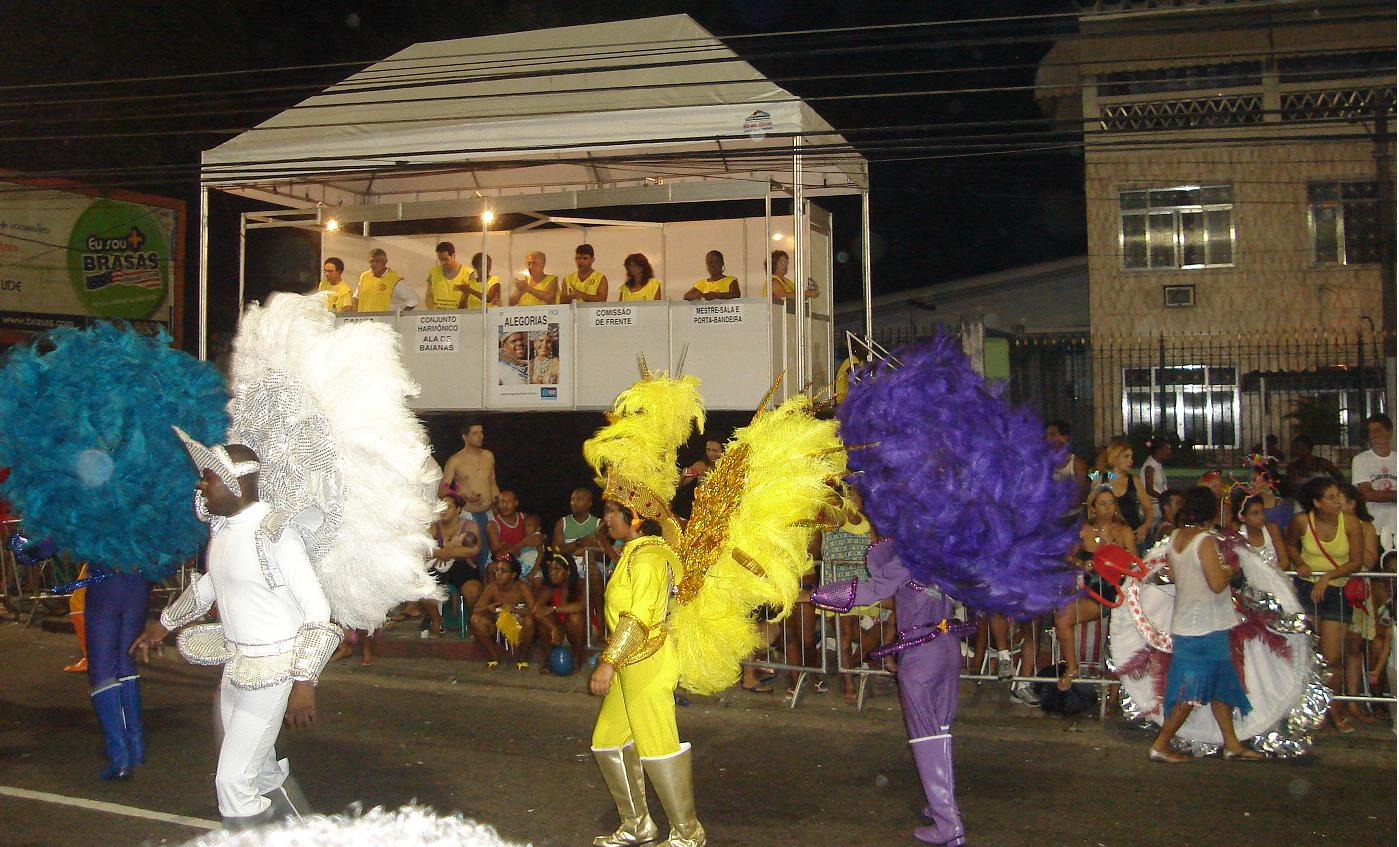 GRES Unidos de Villa Rica - 2010.